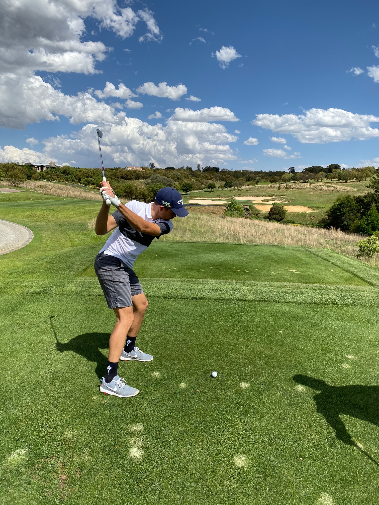 Jules Gounon pratiquant le golf, l'une de ses principales passions.